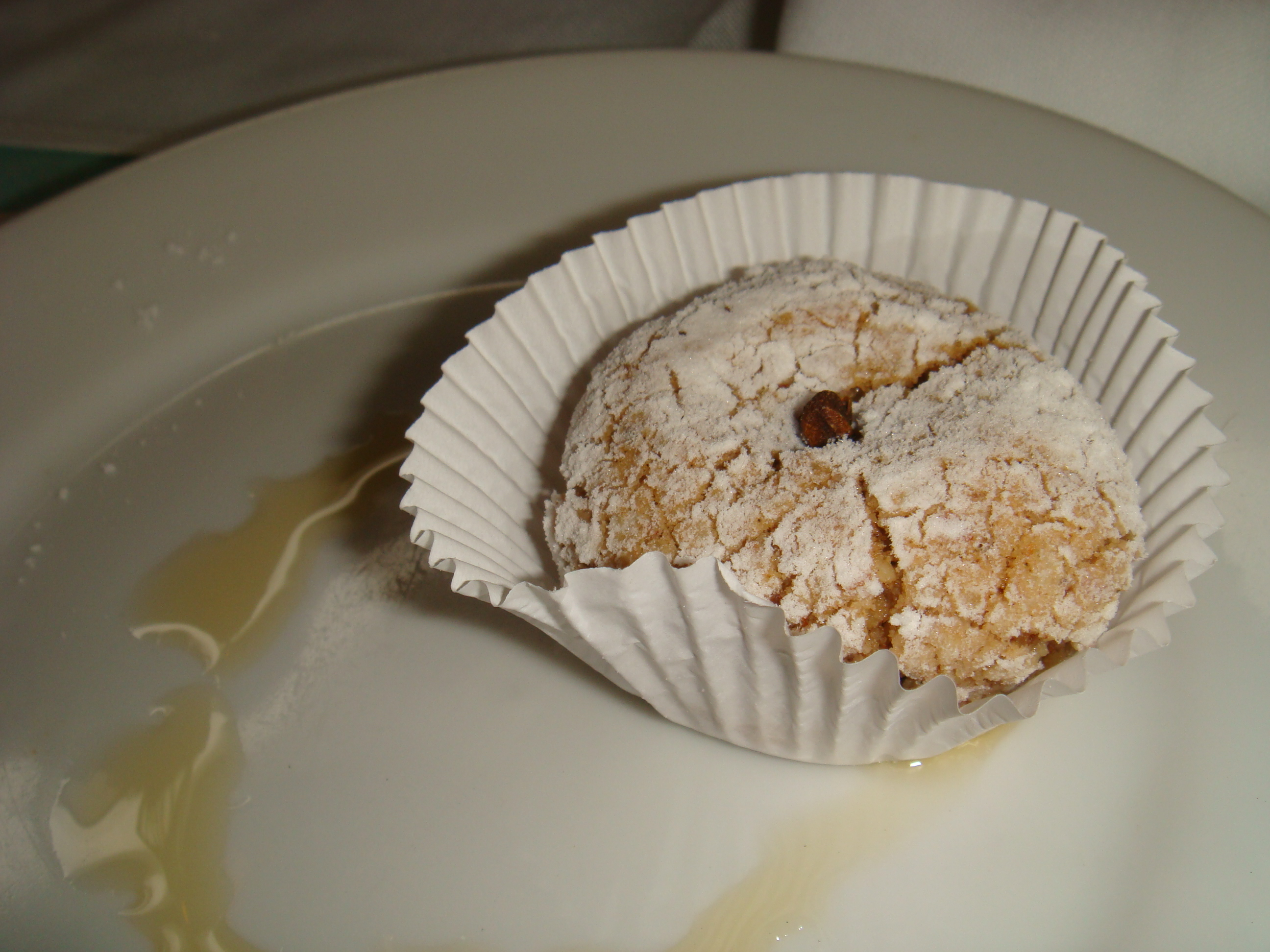 Biscuit aux quatre èpices - biscoito de nozes e amêndoas com especiarias